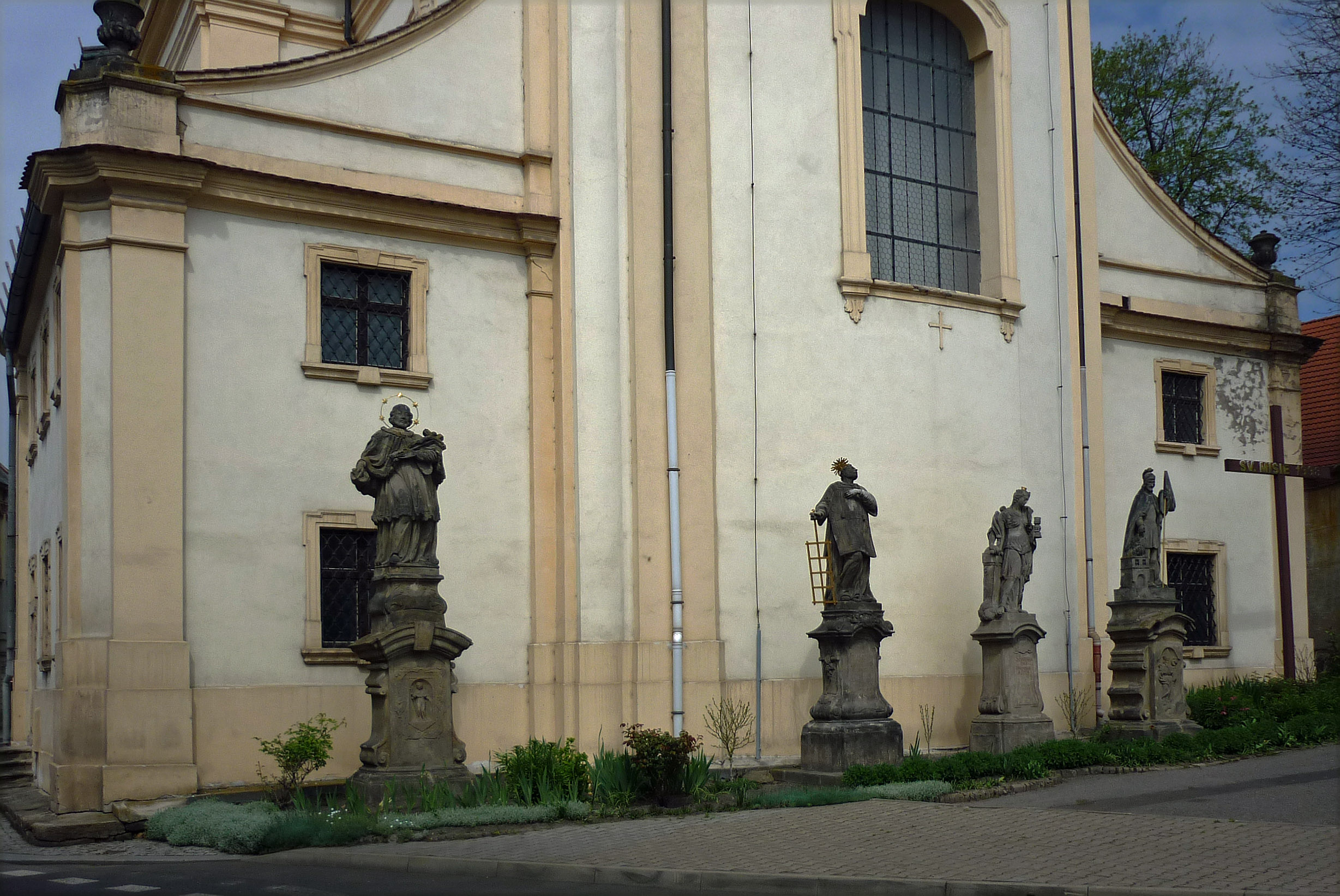 Heiligen-Statuen an der Kirche in Lobositz (Lovosice) - Hl. Nepomuk, Hl. Laurentius, Hl. Barbara und Hl. Wenzel